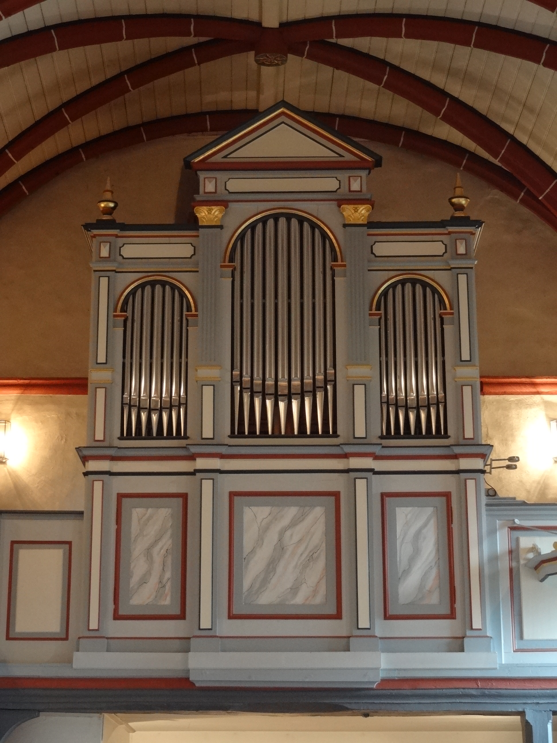 Evangelische Kirche Alten-Buseck